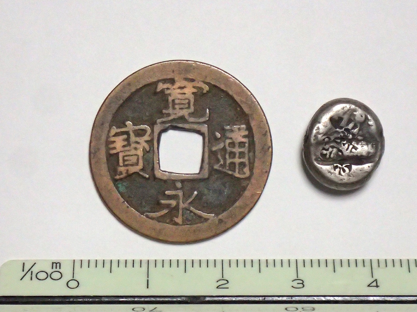 銀1匁(3.768g)相当の慶長豆板銀、およびほぼ1匁(3.740)の寛永通寳